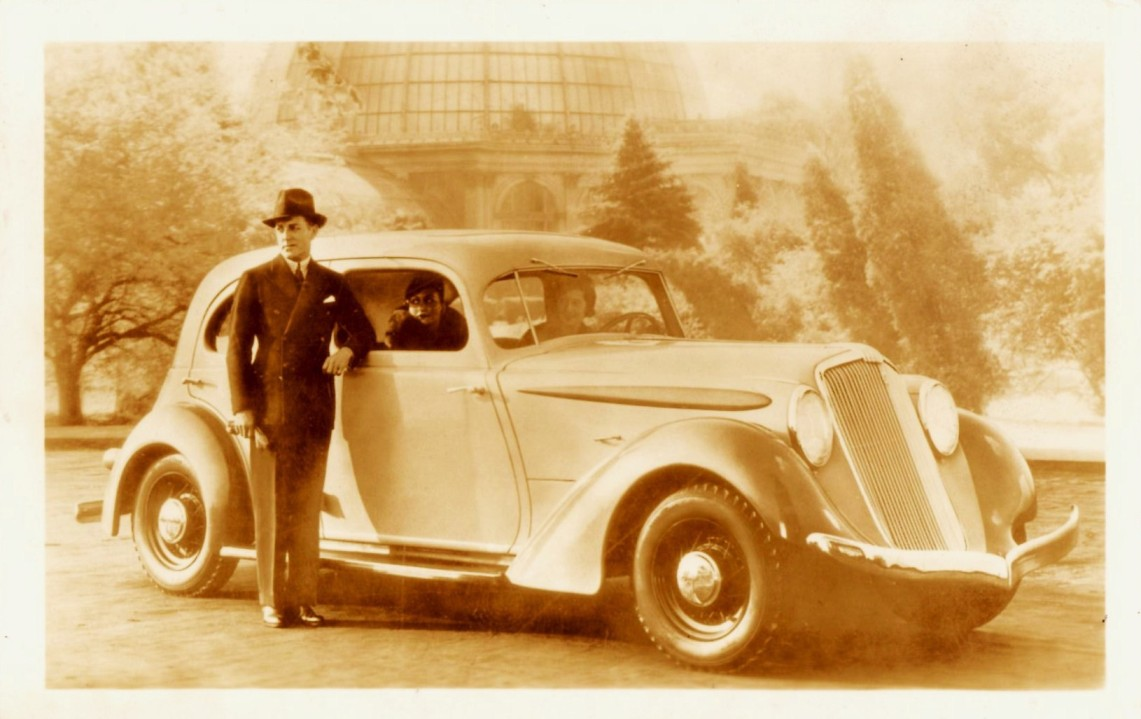 1934 Hupmobile Model J Aero-Dynamic Sedan